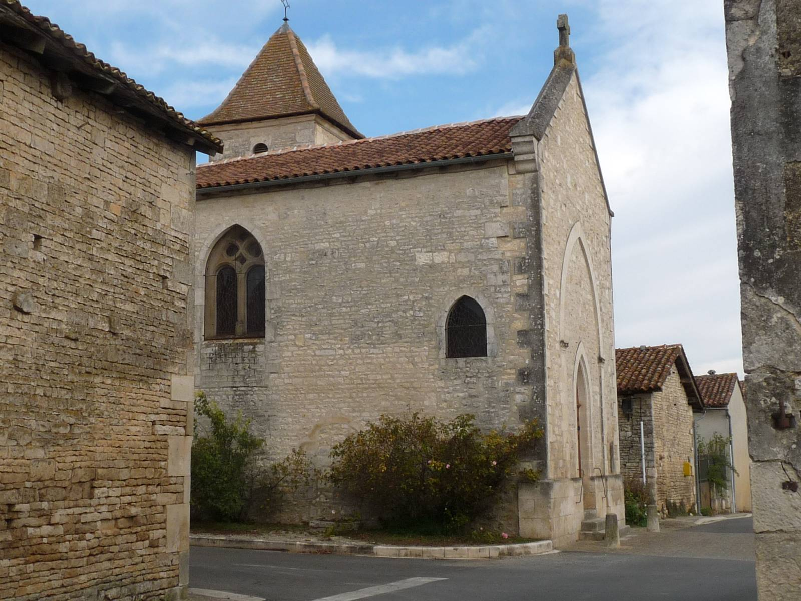 église de Bayers, Charente, France